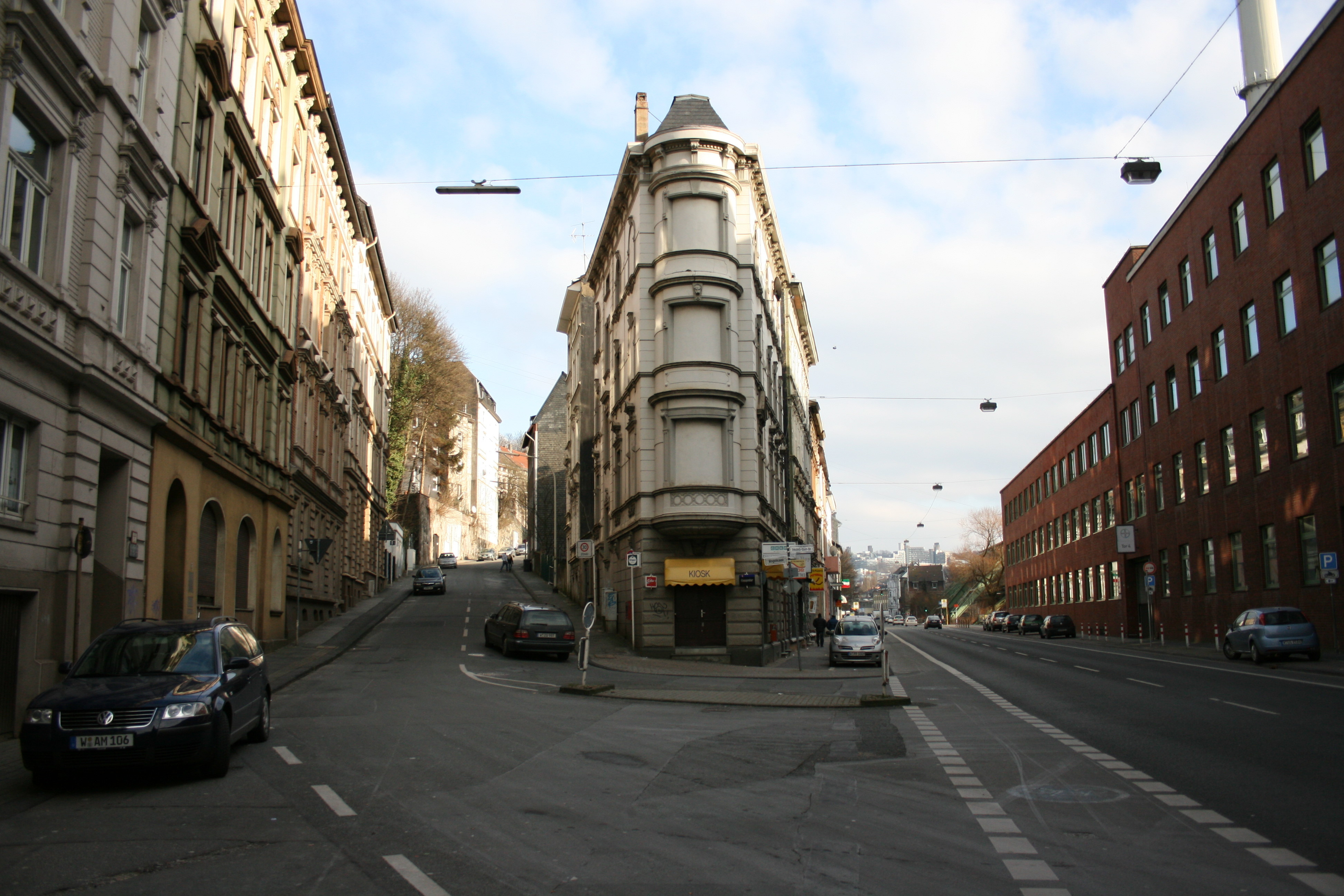 Vogelsaue (links) und Friedrich-Ebert-Straße (rechts) in Wuppertal